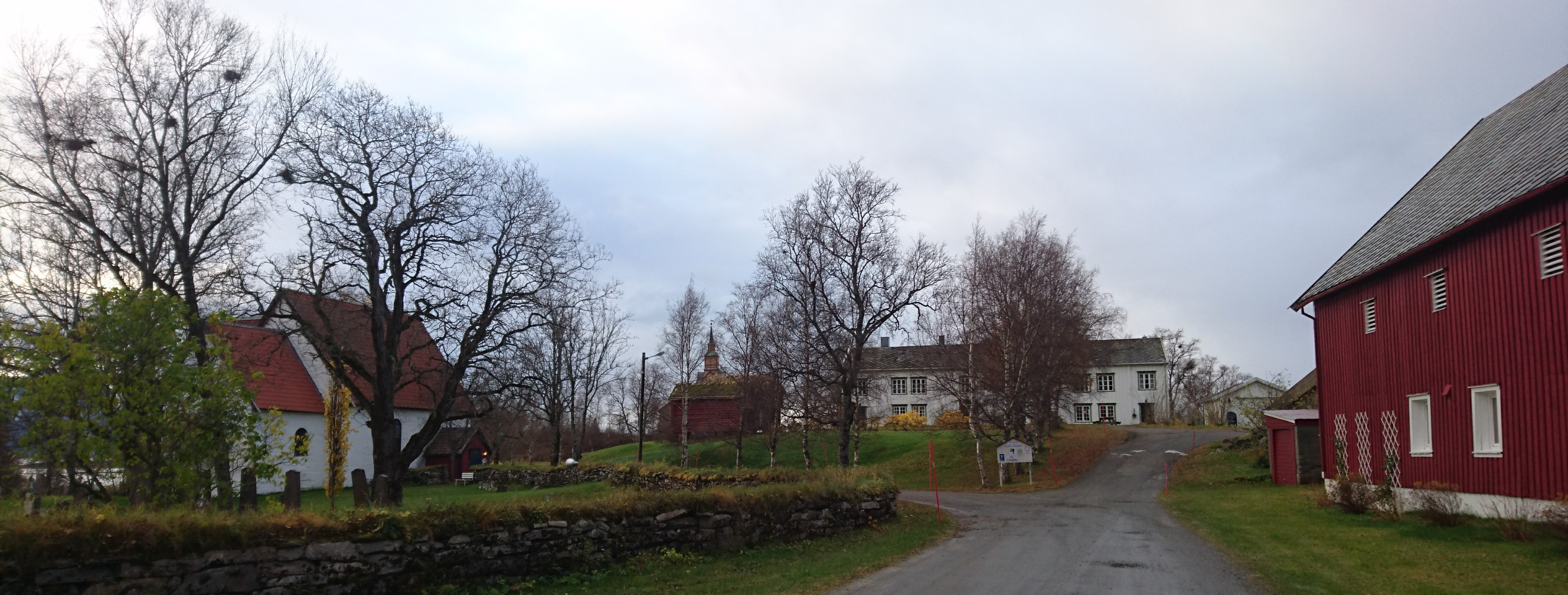 Gildeskål kirkested